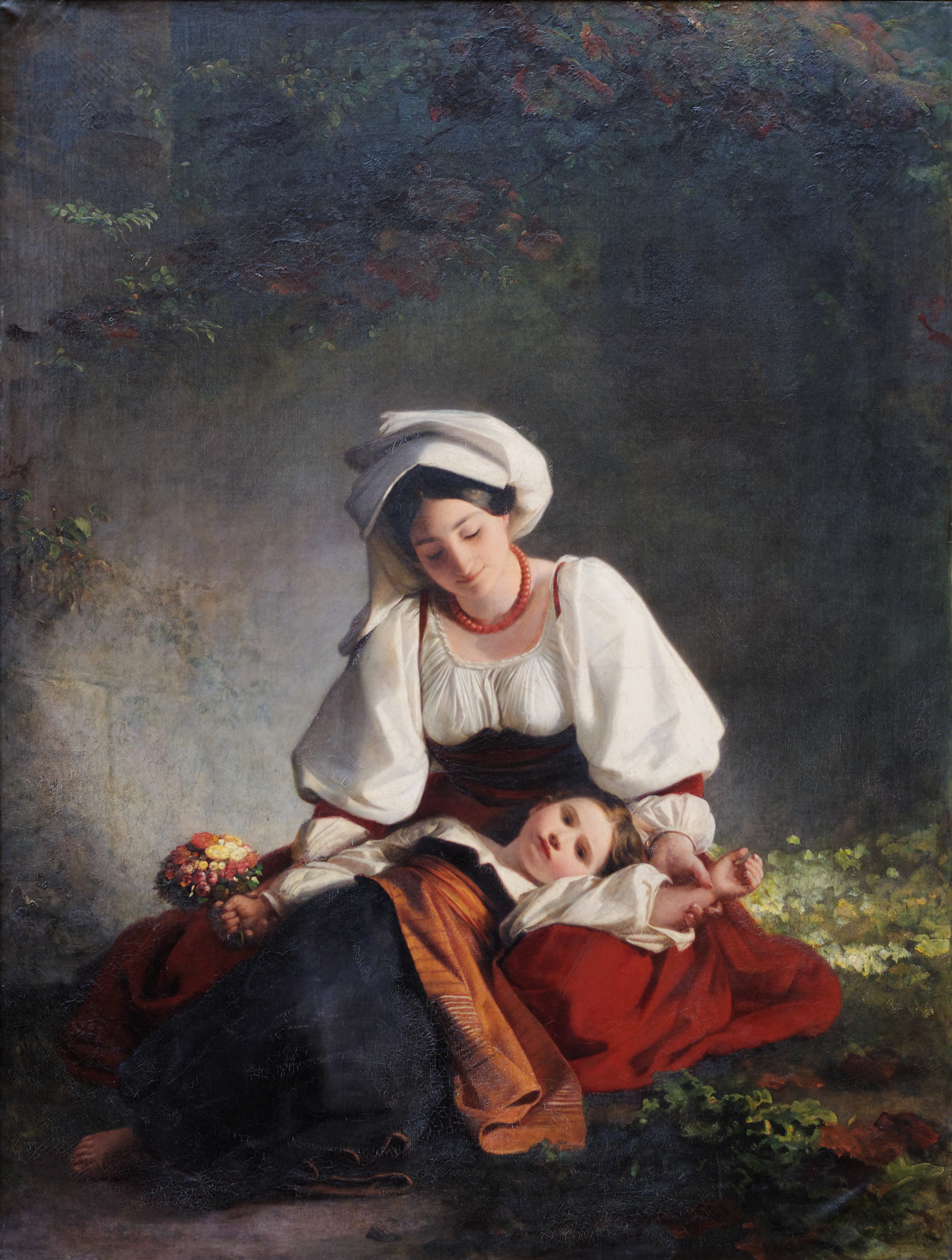 Eine Mutter aus Alvito A Mother from Alvitolabel QS:Lfr,"Une märe d'Alvito" label QS:Len,"A Mother from Alvito" label QS:Lde,"Eine Mutter aus Albano"